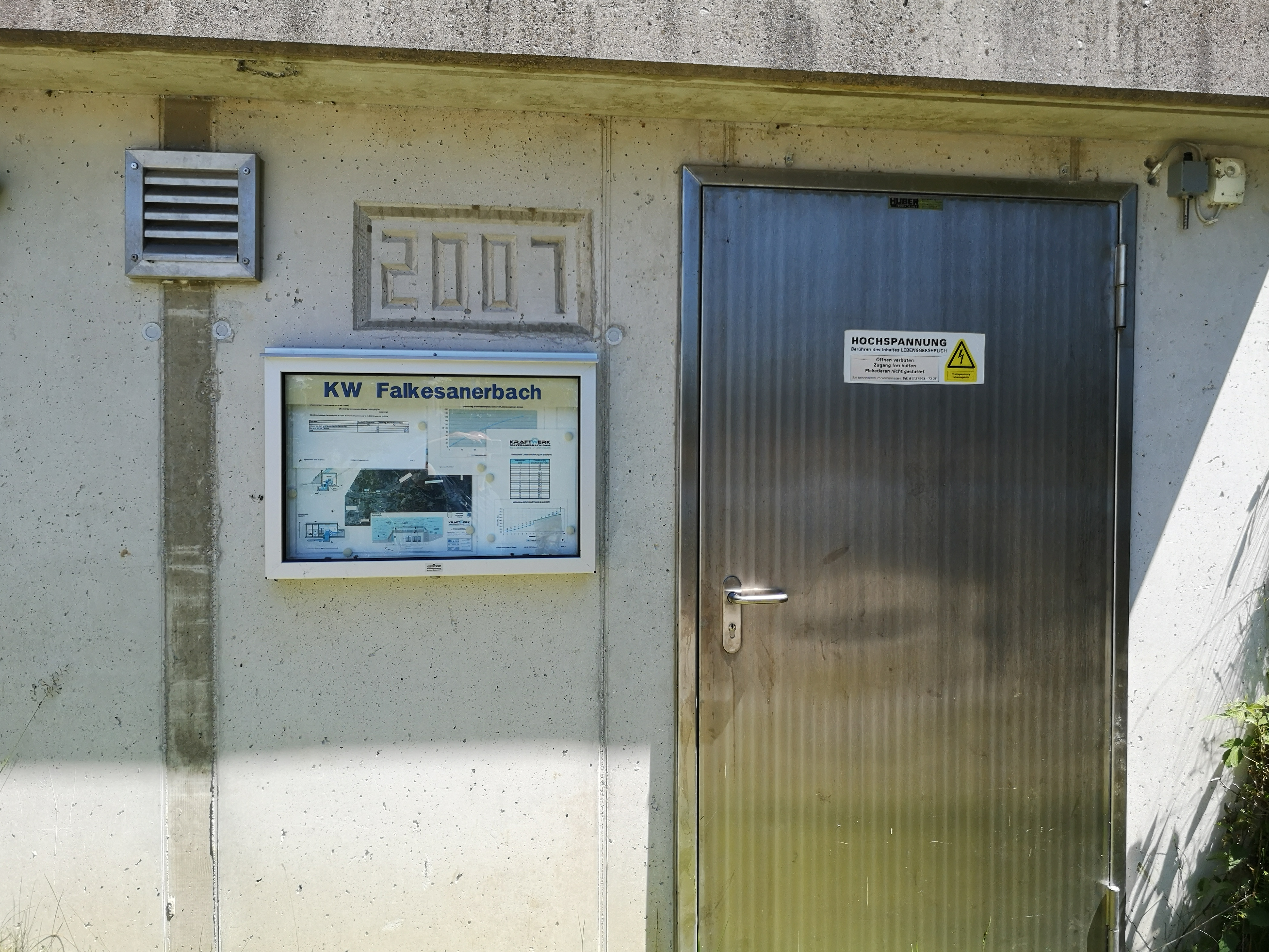 Hier wird der Wasserreinlauf für das Laufkraftwerk kontrolliert.